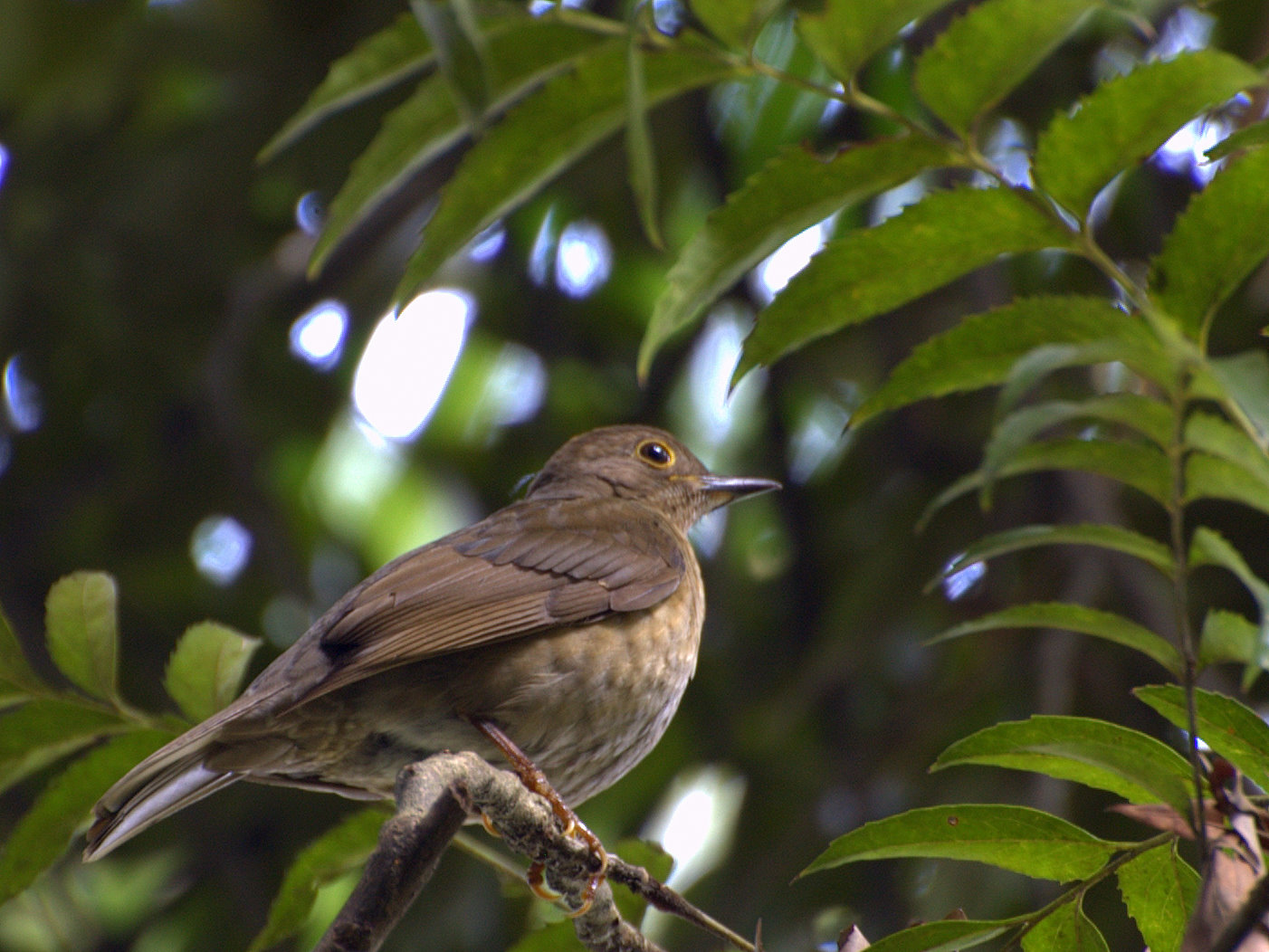 Jardim Botânico de São Paulo Yellow-legged Thrush (Platycichla flavipes) Female